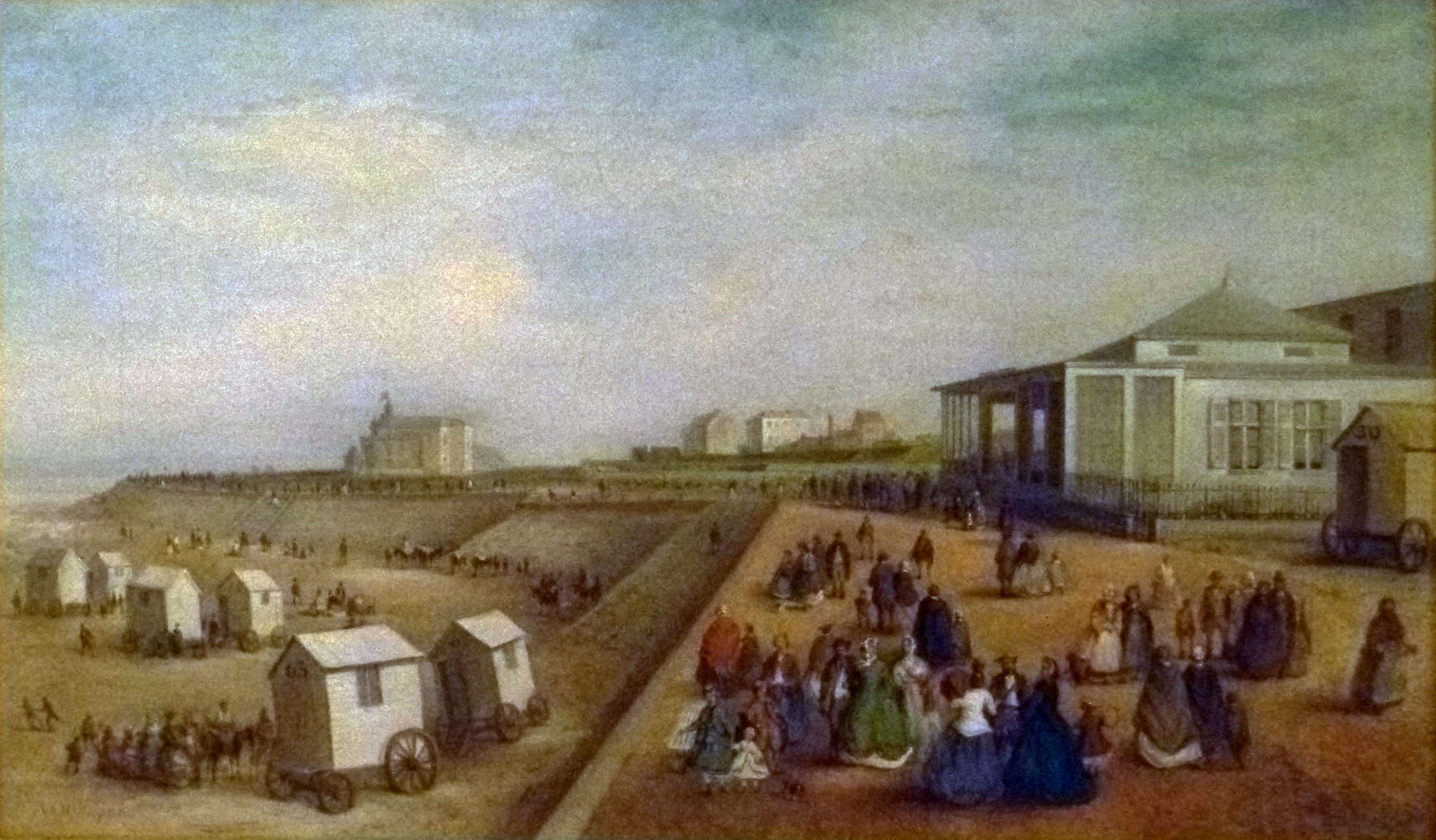 "Strand en zeedijk van Oostende" (ca. 1855), olieverf op doek door Michel Van Cuyck (1797-1875); Collectie stad Oostende in MuZee